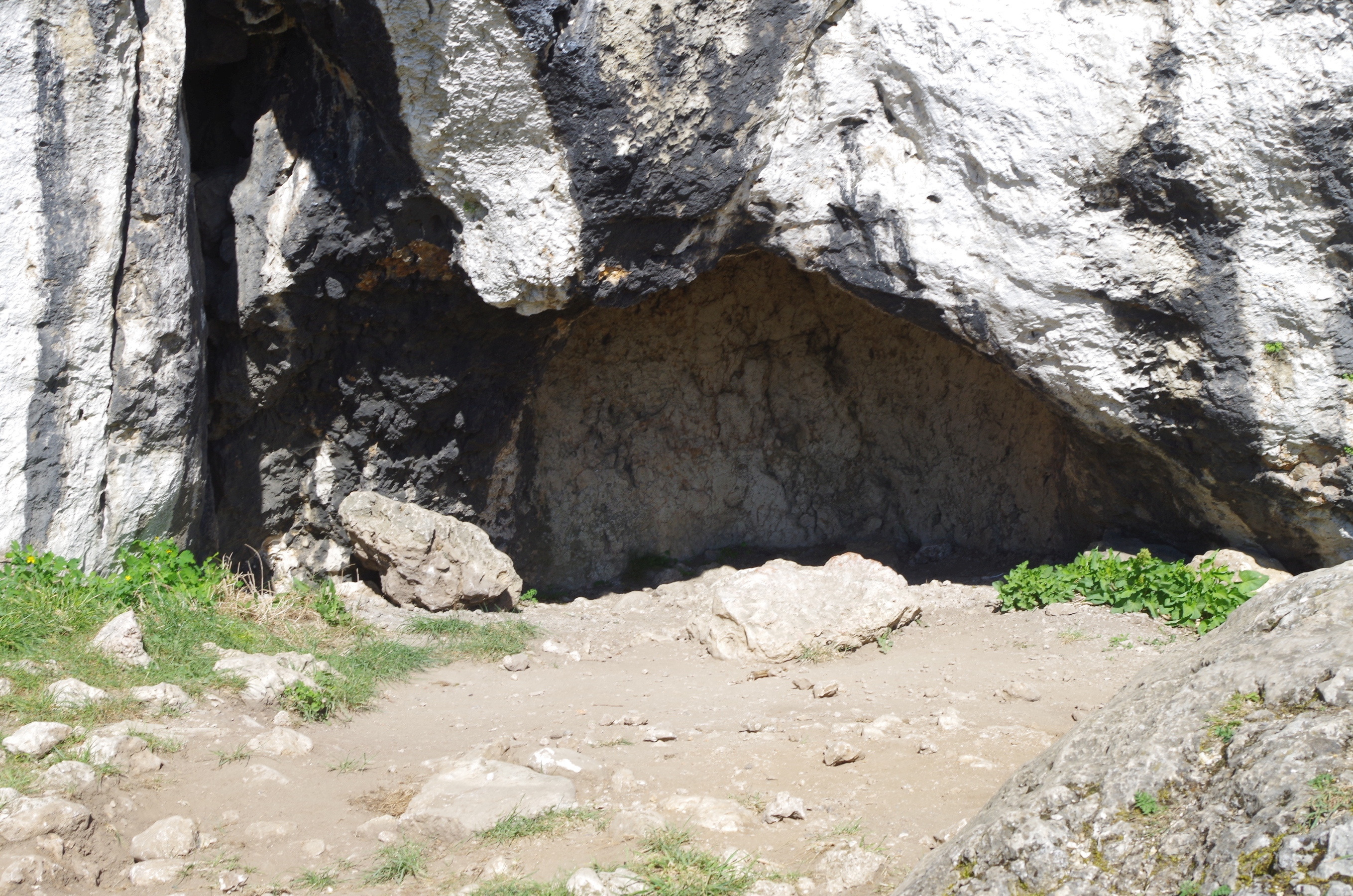 Nyża w skale Studnisko (Skały Rzędkowickie)